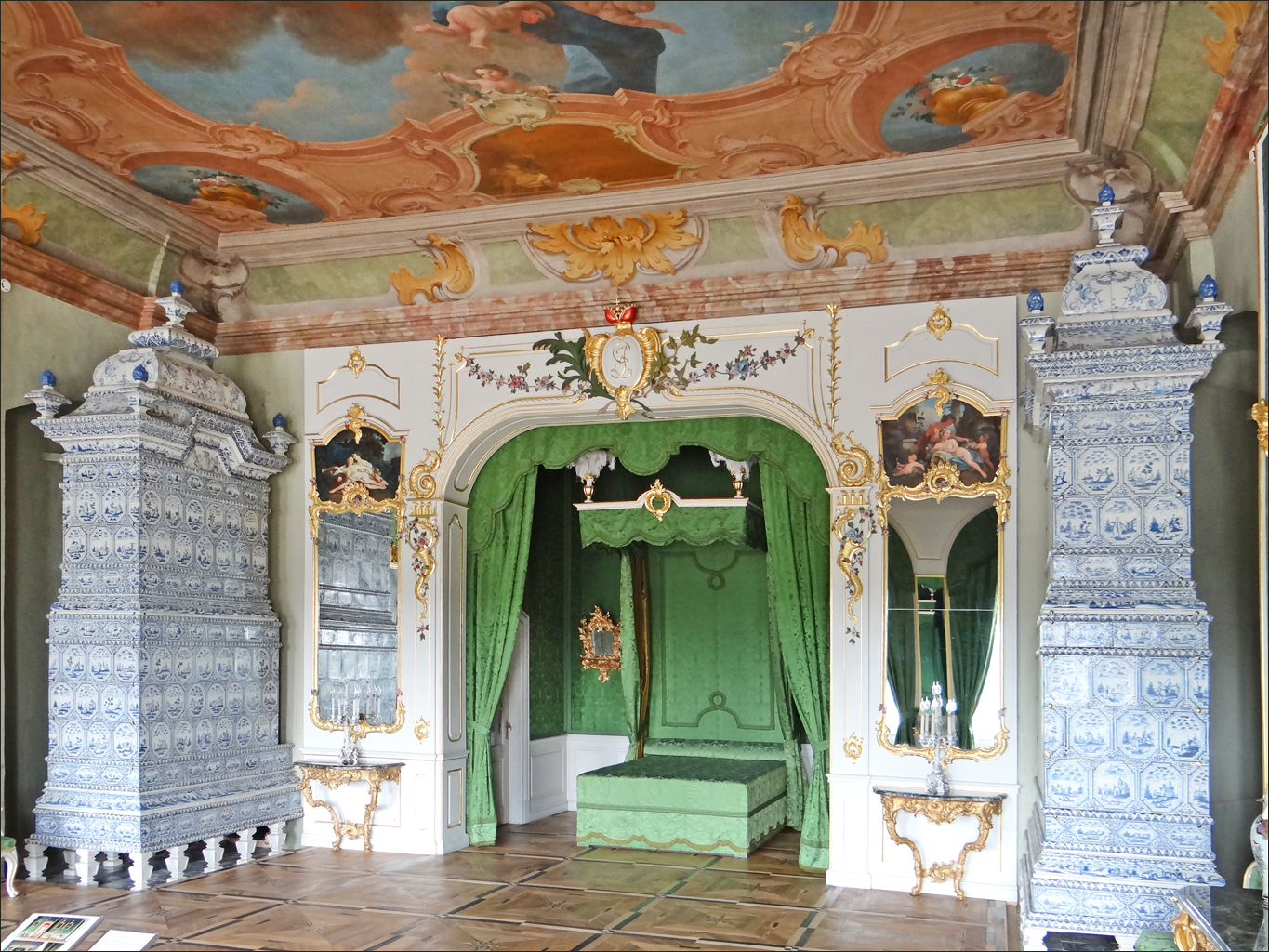 Le lit à baldaquin du Duc de Courlande Le lit est entouré par deux poêles à chargement arrière, recouverts de carreaux de faïence de Delft. ___________ Le palais de Rundale est l'un des monuments les plus remarquables de l'art baroque et rococo en Lettonie. Il a été construit entre 1736 et 1740 comme résidence d'été du duc de Courlande Ernst Johann von Biron (1690-1772), favori de l'impératrice de Russie Anna Ioannovna (1693-1740). L'architecte italien Francesco Bartolomeo Rastrelli (1700-1771) a conçu le Palais de Rundale et en a supervisé les travaux de construction. Il est l'architecte de nombreux bâtiments officiels de Saint Pétersbourg. Après la mort de l'impératrice Anna Ioannovna, le duc a été arrêté et envoyé en exil en Sibérie. Les travaux de construction du palais ont repris après le retour du duc en 1763 au début du règne de l'impératrice Catherine II. La majeure partie de l'intérieur du palais a été créée entre 1765 et 1768. Les maîtres italiens de Saint-Pétersbourg : Martini Francesco et Carlo Zucchi sont les auteurs des peintures sur les plafonds et les murs tandis que le sculpteur Johann Michael Graff de Berlin a fait les décorations en stuc sur fond de marbre artificiel. Article de Wikipedia sur Biron Article de Wikipedia sur le palais Site du palais de Rundale (en)